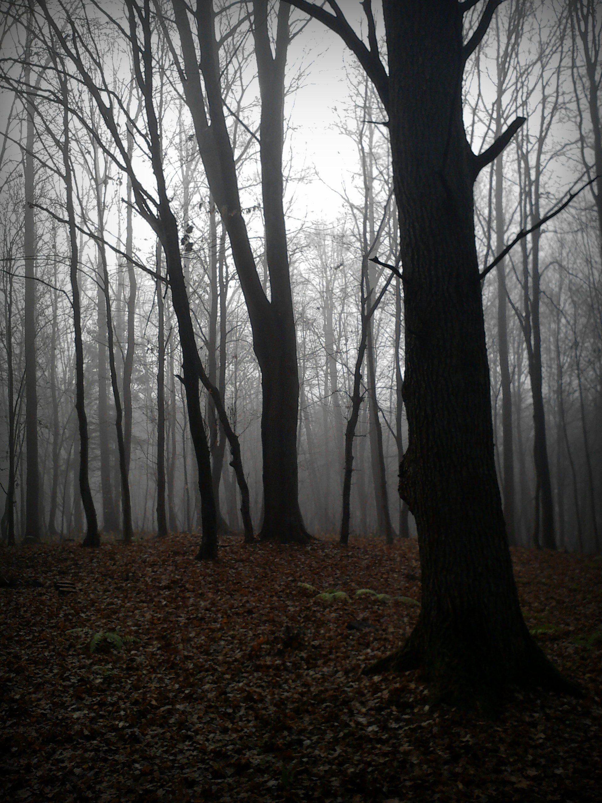 Autor: Adrian Grzegorz 25.11.2012